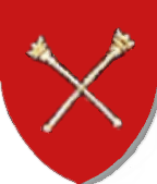 herb Kanclerza Rzeczypospolitej author User:Mathiasrex - Maciej Szczepańczyk